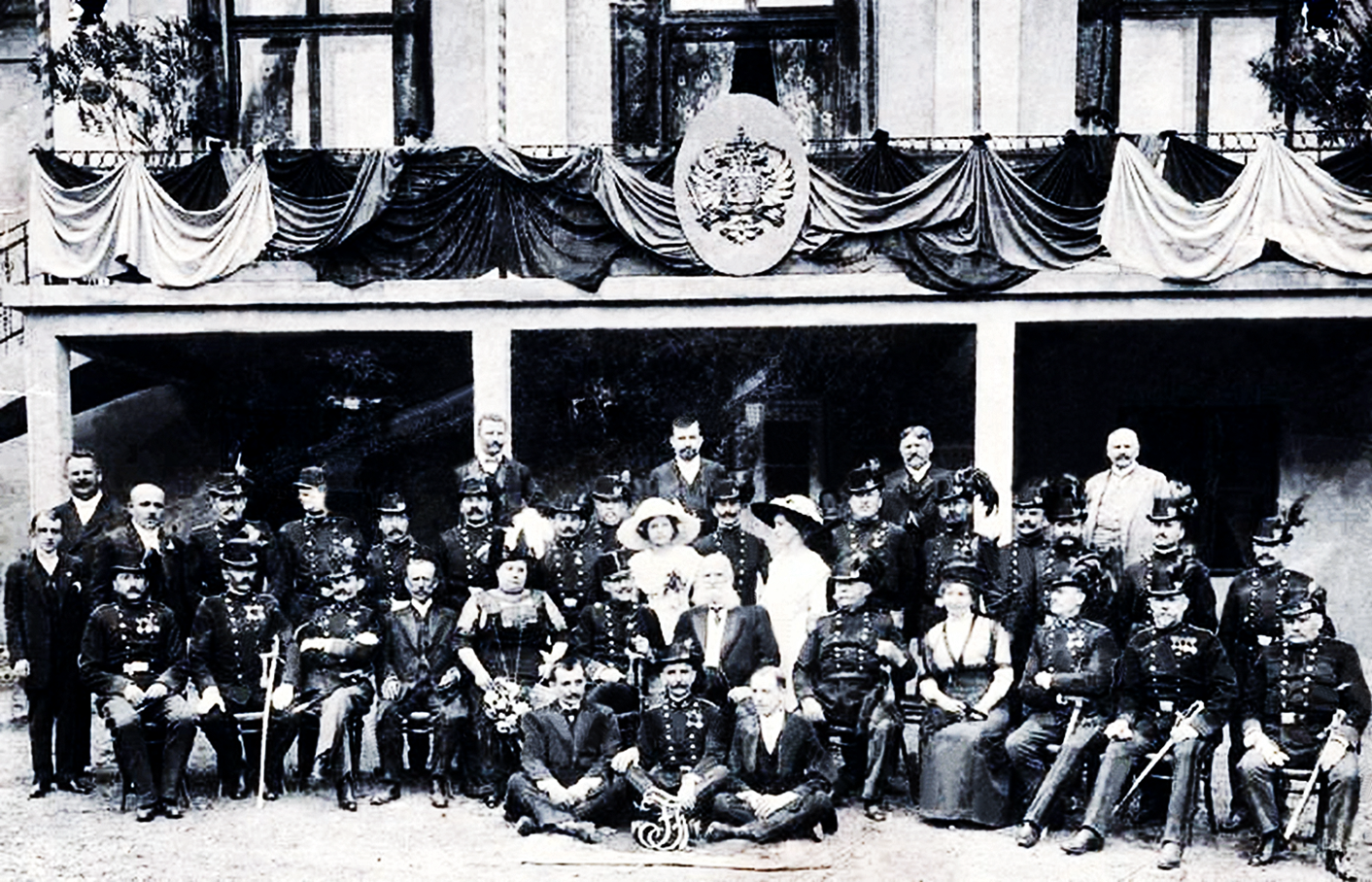 Baron von Fürth bei Feierlichkeiten zum 80. Geburtstag Kaiser Franz Josephs I. am 18. August 1910